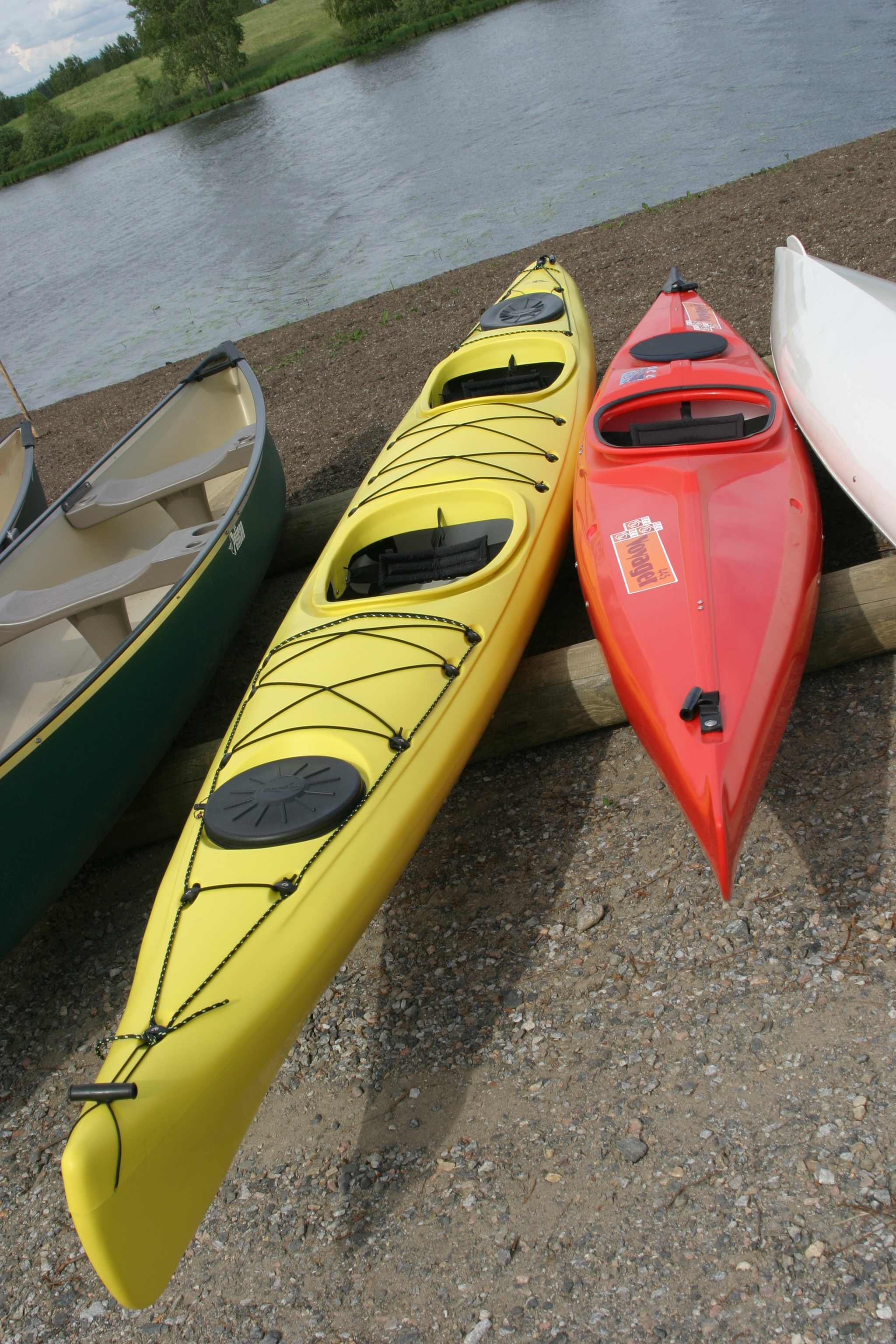 Kajakki